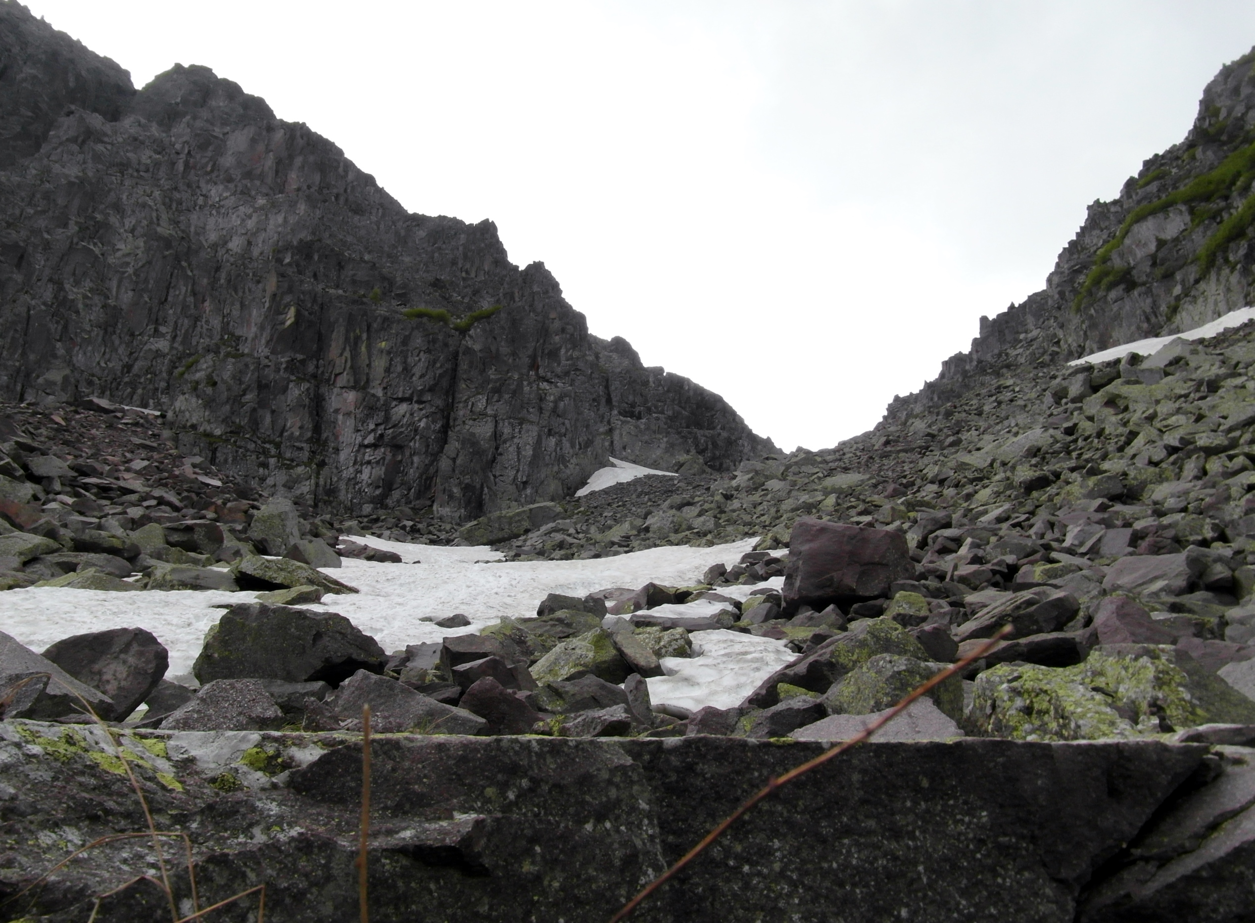 Discesa dal Monte Cauriol